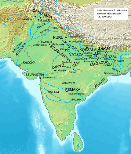 Ősi királyságok és városok Indiában Buddha idején